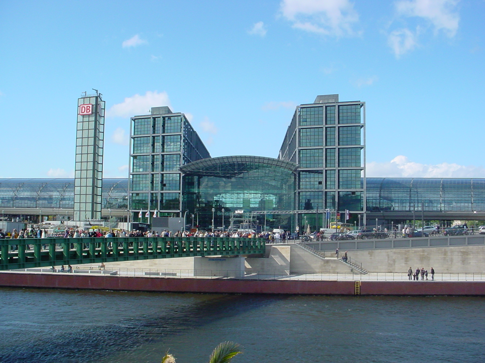 Südseite des Berliner Hauptbahnhofes